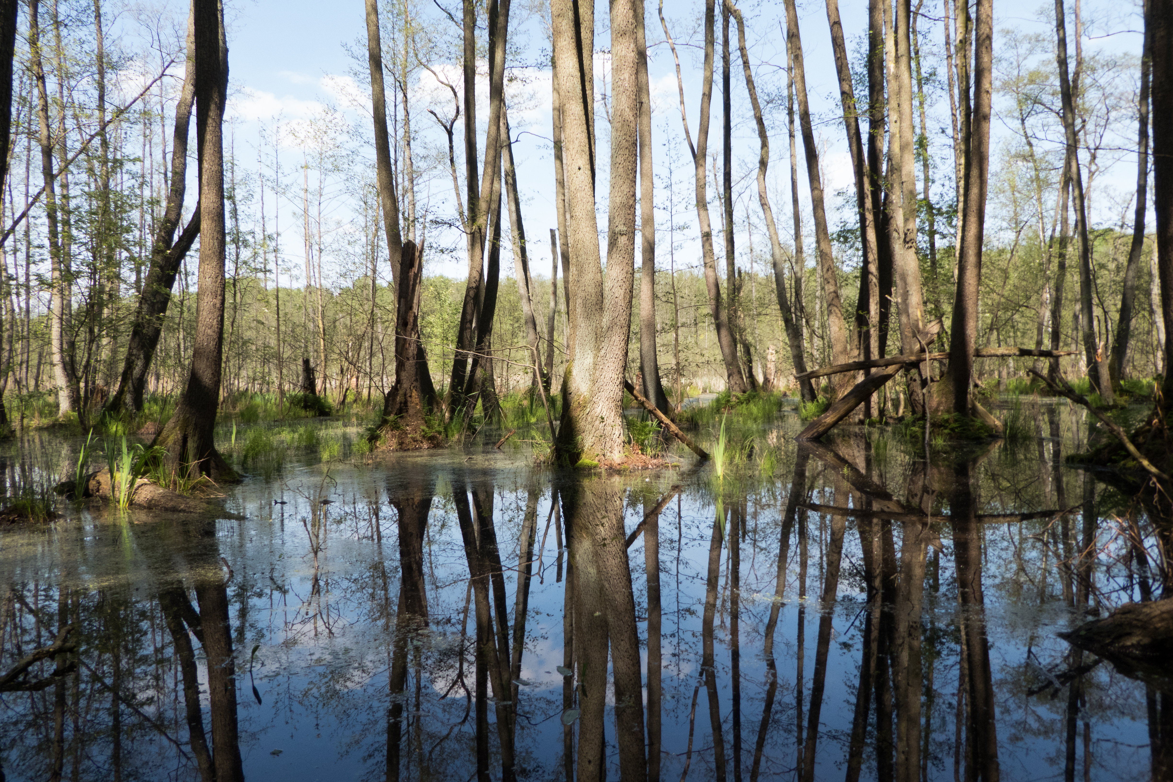 Berlin, Spandau, Spandauer Forst (LSG-17), NSG Grosser und kleiner Rohrpfuhl (Kennung:2; WDPA: 81770). Westliches Ufer des Großen Rohrpfuhl.